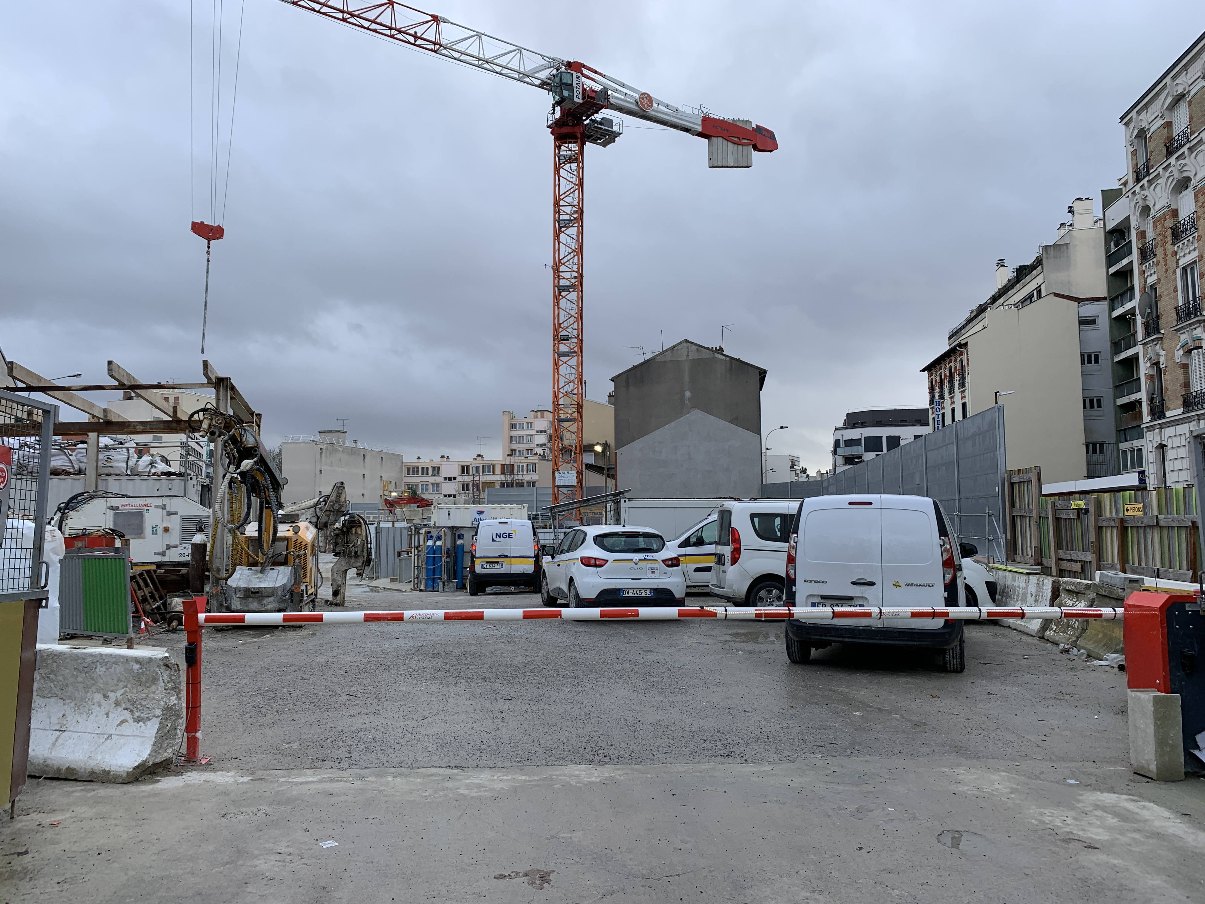 Chantier de construction de la station métro Place Carnot, Romainville.